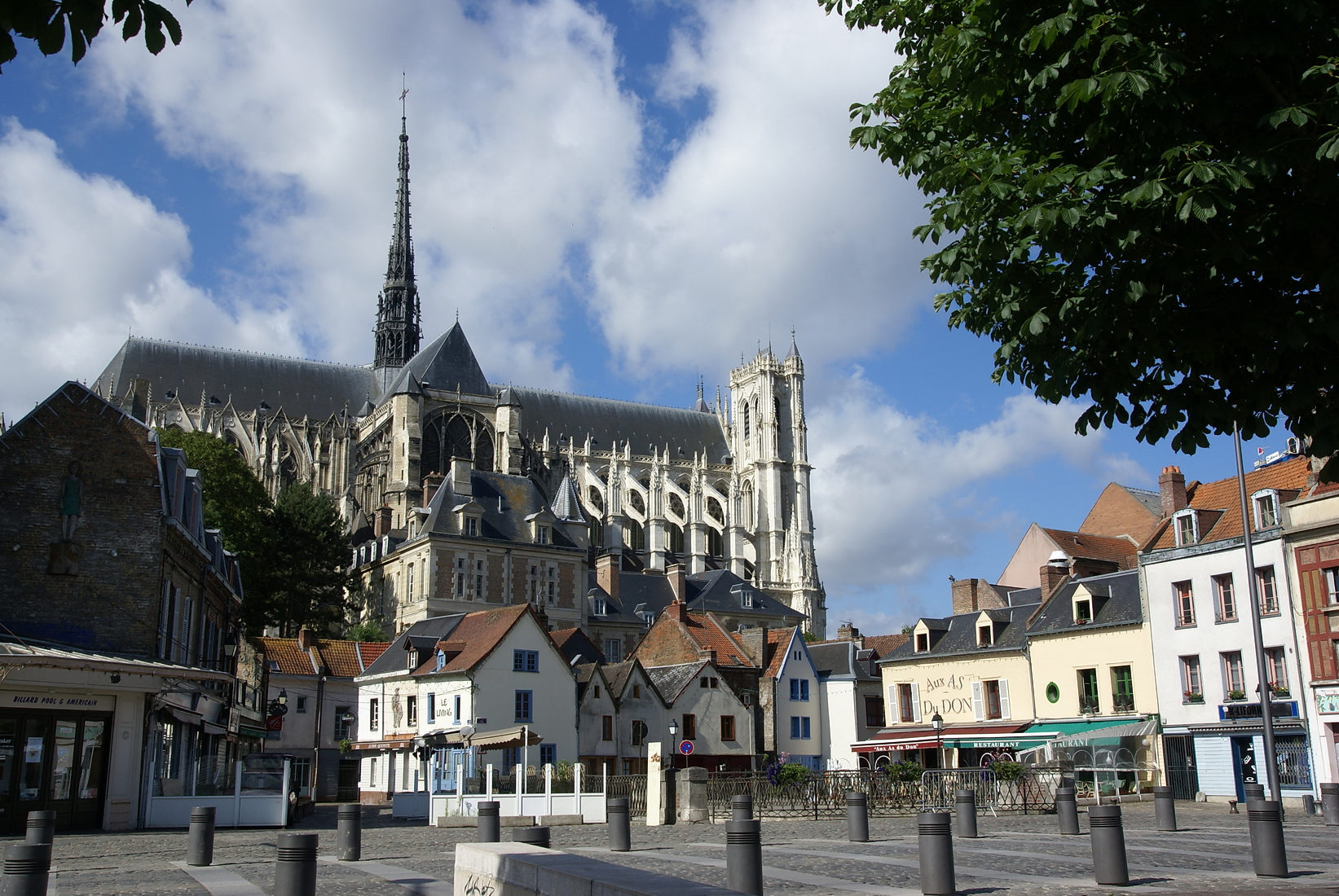 Cathédrale d'Amiens vue depuis le quai Belu .